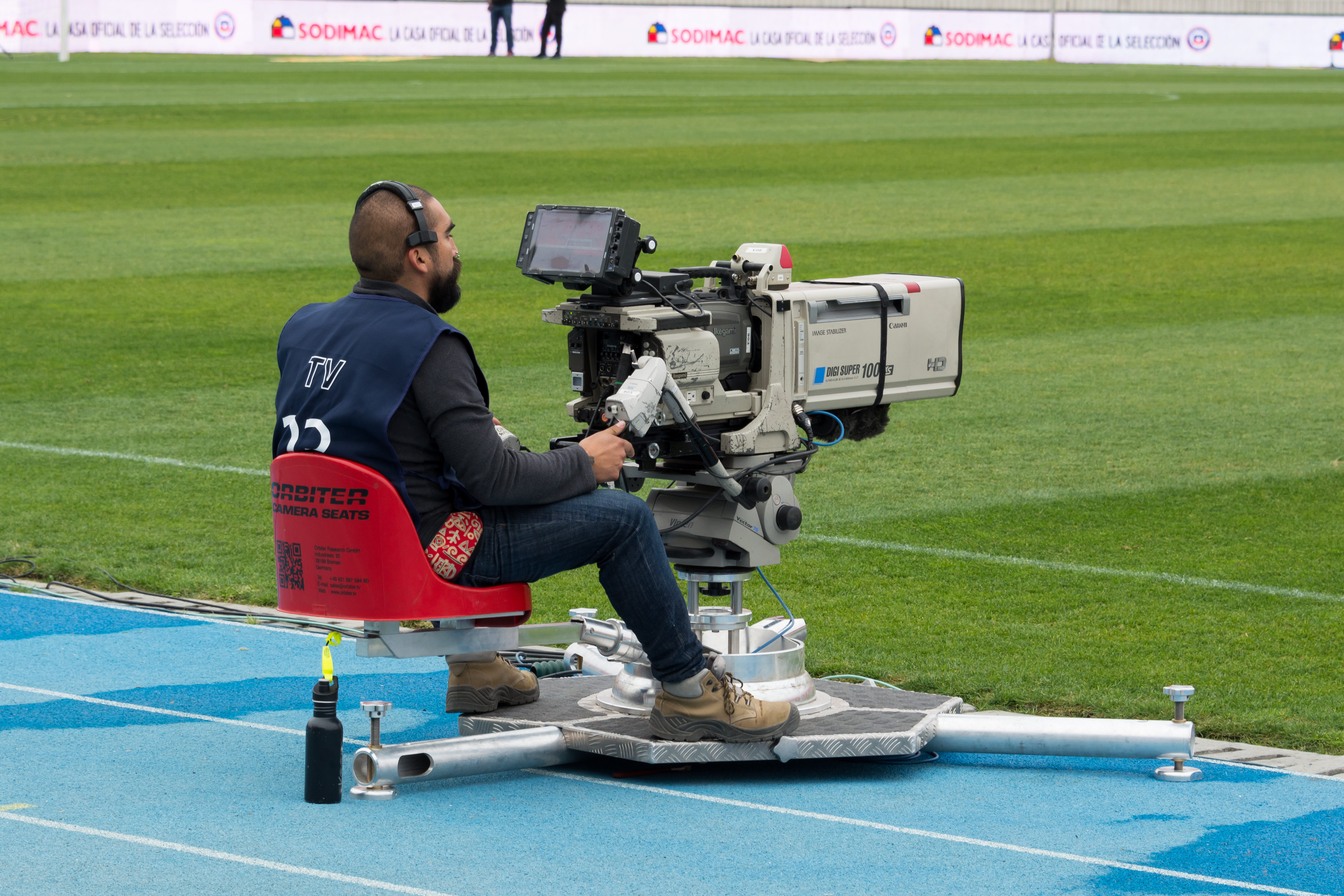 Cámara con Orbiter, Chile v Colombia, Estadio Nacional, Ñuñoa, Santiago, Chile.